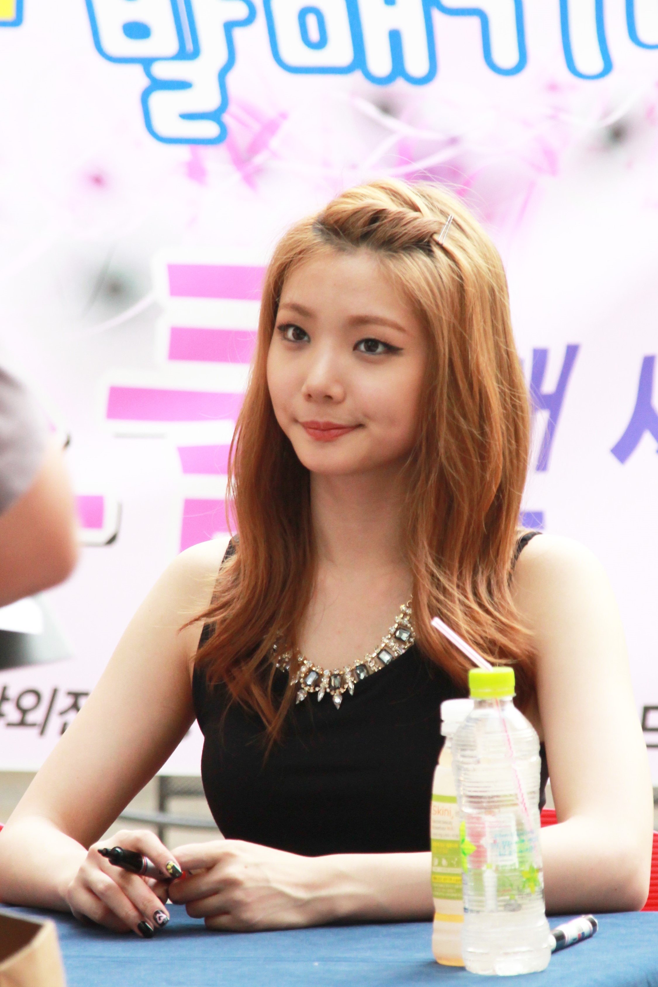 130629 애프터스쿨 메세나폴리스 '첫사랑' 팬싸인회